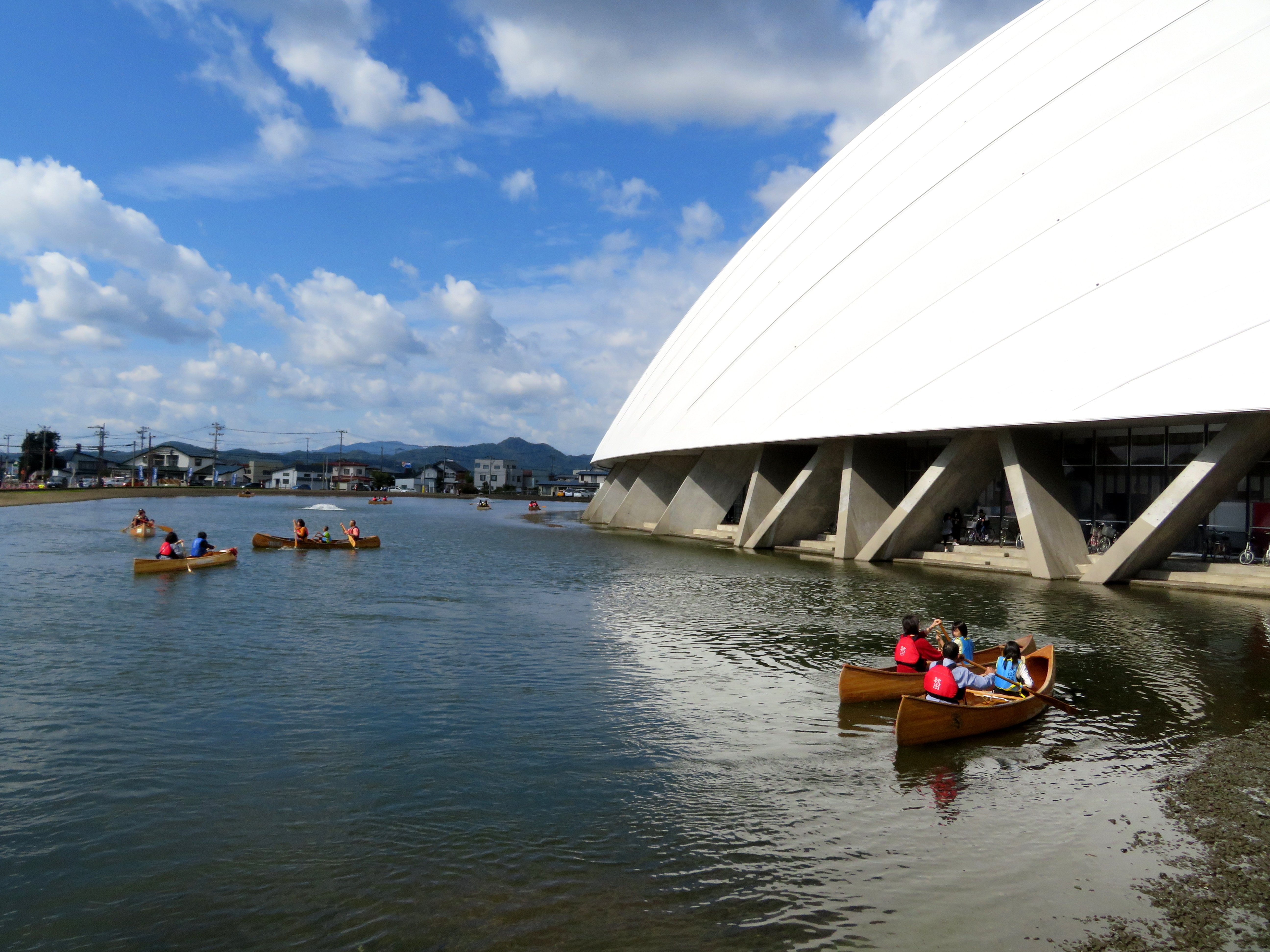 大館樹海ドーム（ニプロハチ公ドーム） Canon PowerShot SX720 HS